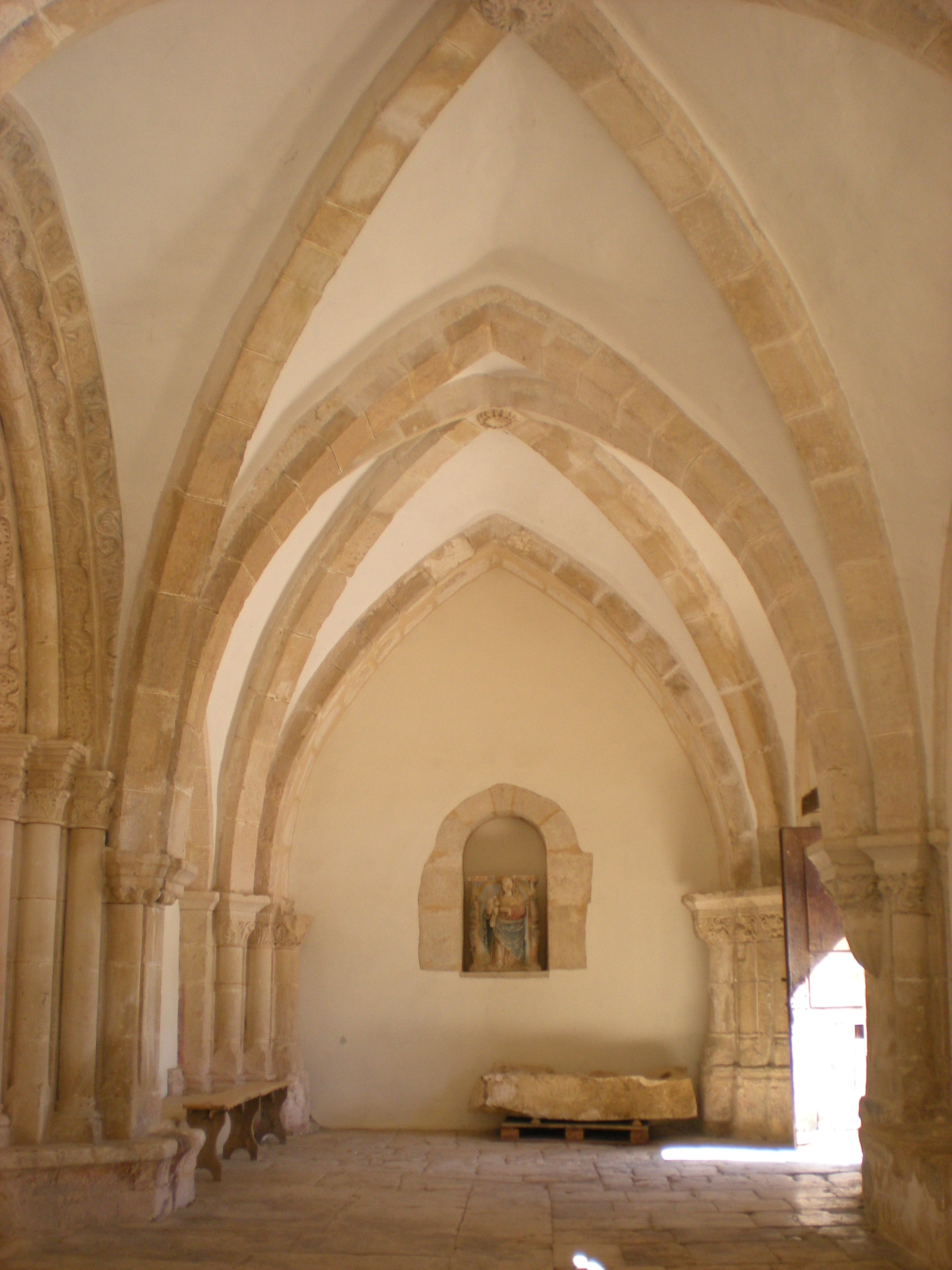 San Andres elizako (Erentxun, Iruraitz-Gauna, Araba) eliz atari erromanikoa, XIII. mendean eraikia.